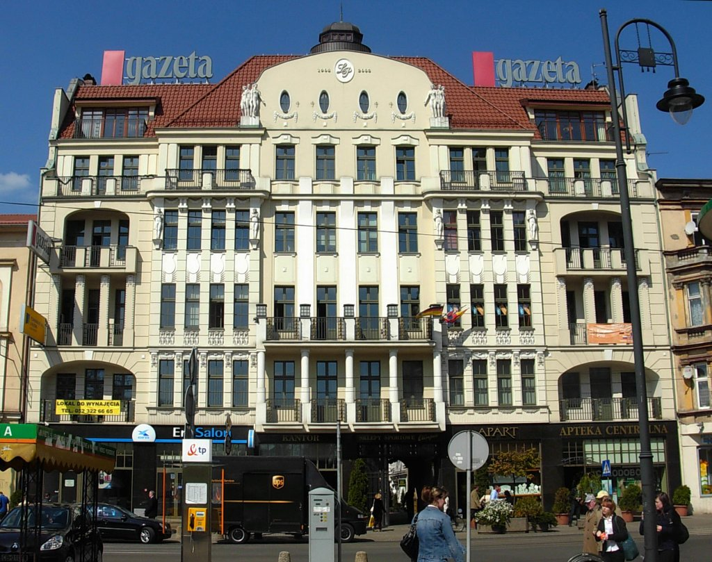 Kamienica ul. Gdańska 27 w Bydgoszczy